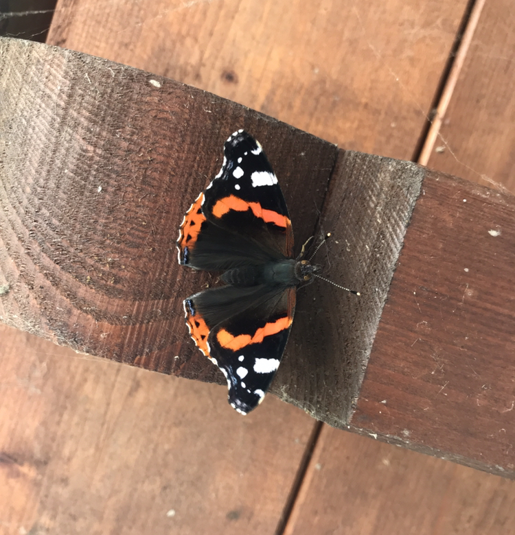 Farfalla Vanessa con ali spiegateLatina: Vanessa atalanta